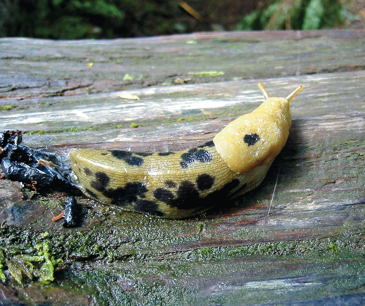 Banana Slug (Ariolimax columbianus), Canada